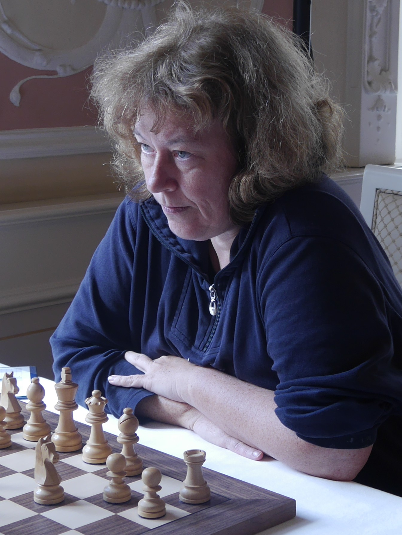 Maria Horvath, Schachbundesliga der Frauen 2016/17 in Baden-Baden.